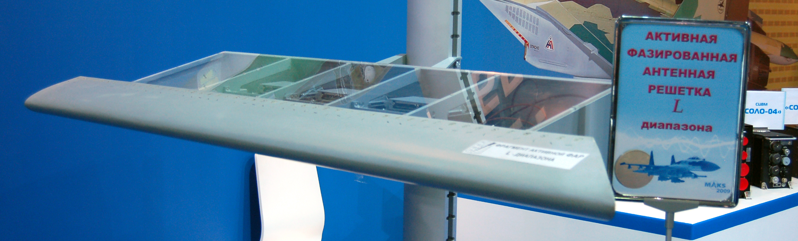 АФАР L-диапазона, разработки НИИП, для размещения в предкрылке. МАКС-2009